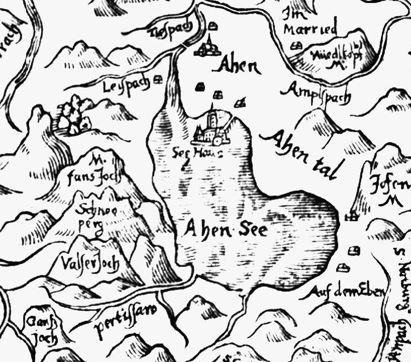 Der Achensee, Ausschnitt aus der Neuen Karte der sehr ausgedehnten Grafschaft Tirol und ihrer Nachbargebiete von Warmund Ygl, 1604/05